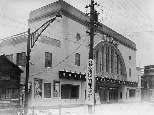 北海道小樽市の松竹座。1934年開館。